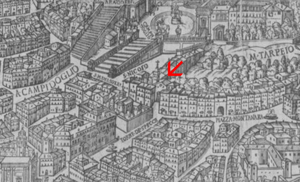 Pianta dei Giovanni Maggi, Paul Maupin & Carlo Losi